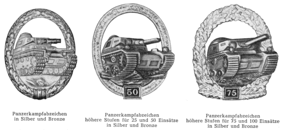 Panzerkampfabzeichen des Heeres in der 57er Version